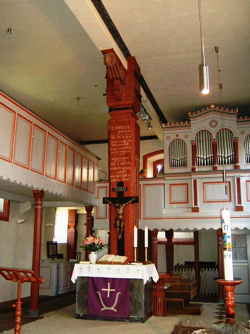 Innenraum der Martinskirche in Petterweil